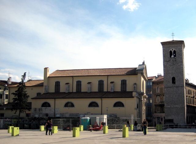 Crkva Uznesenja Blažene Djevice Marije, Rijeka